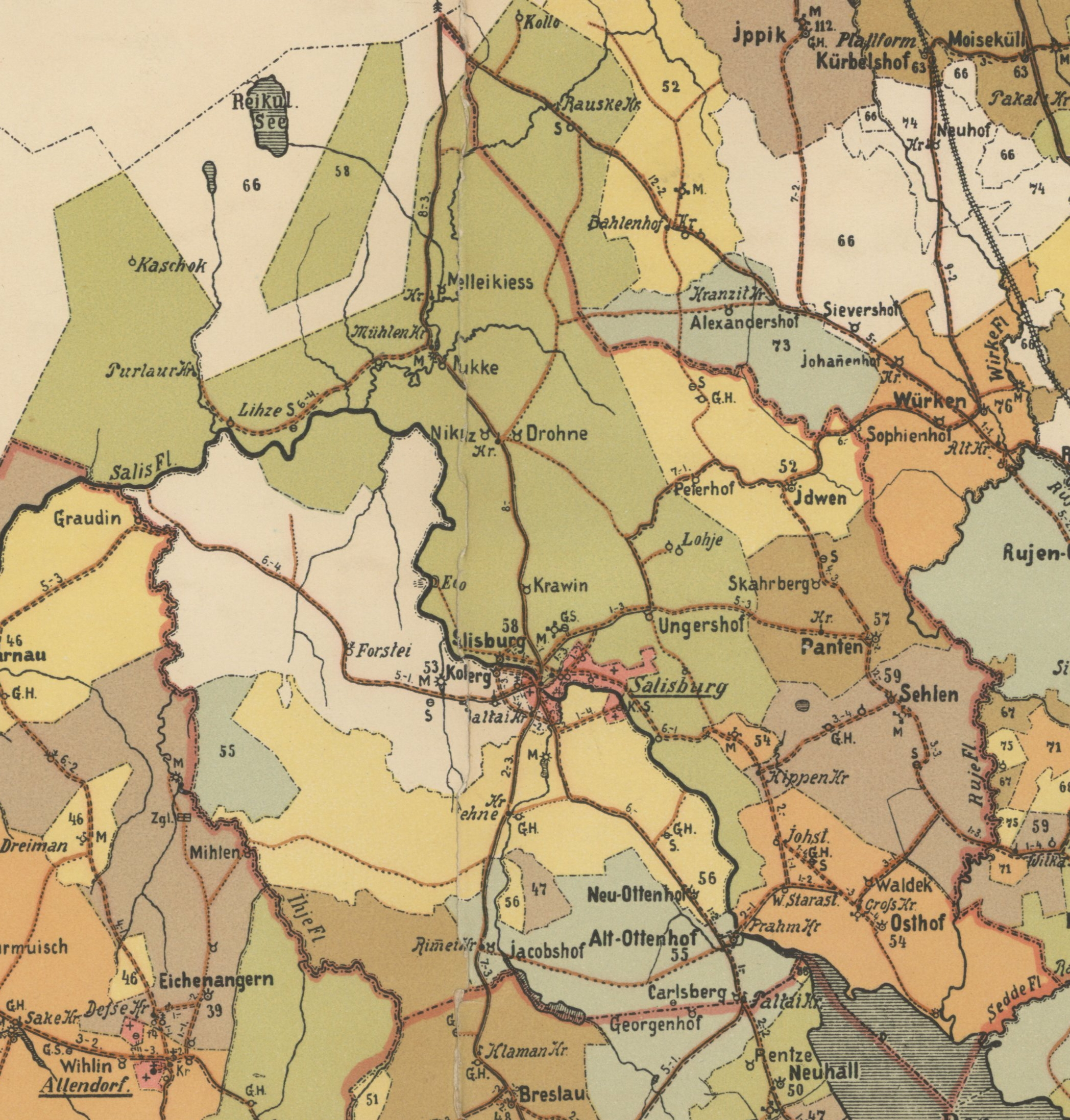 Väike-Salatsi kihelkonna mõisad 1903. aasta kaardil.